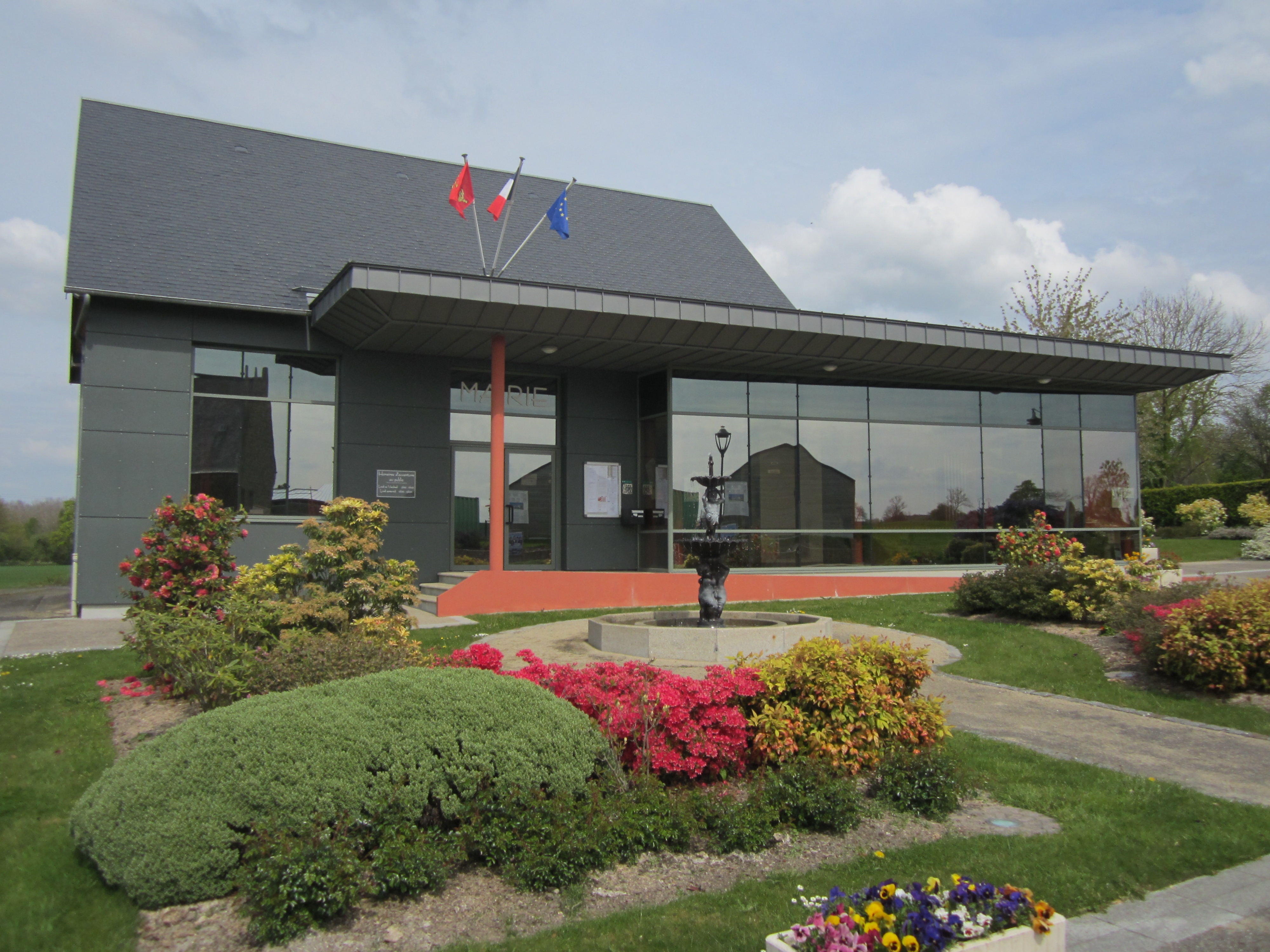 Marcey-les-Grèves, Manche